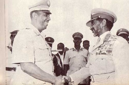 Siad Barre meets Haile Selassie